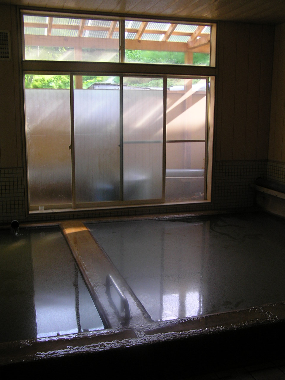 二股ラヂウム温泉内湯